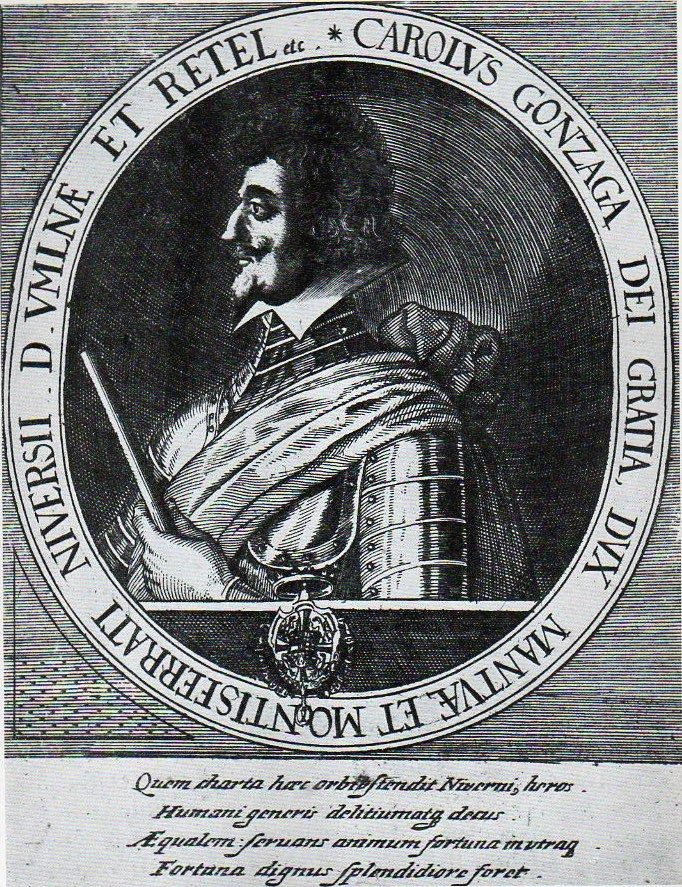 Porträt Carlo Gonzagas, Herzog von Mayenne aus dem zweiten Band von Matthäus Merians Theatrum Europaeum